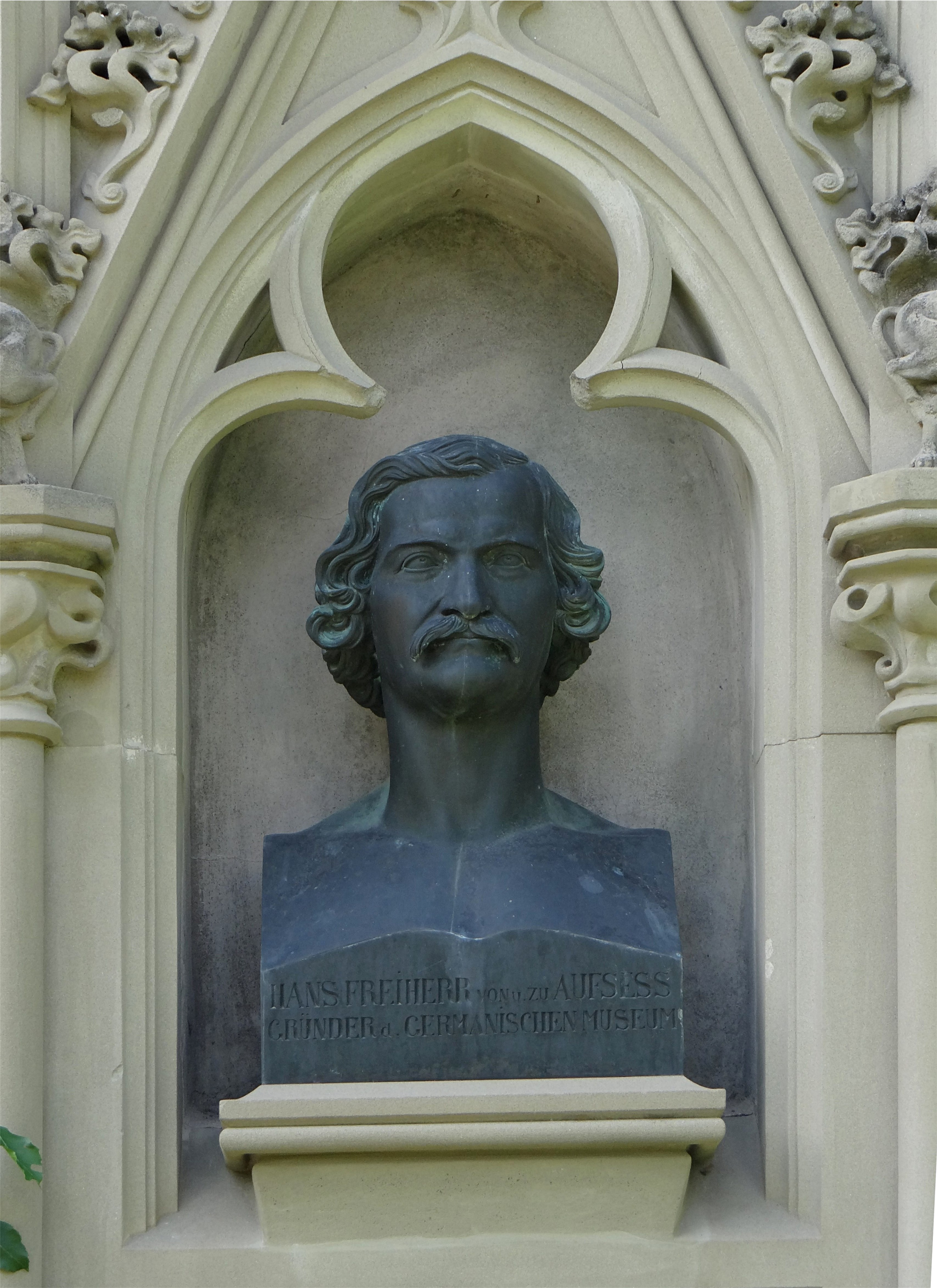 Buste de Hans von und zu Aufseß, façade de l'église paroissiale évangélique luthérienne à Aufseß, Arrondissement de Bayreuth, Allemagne.